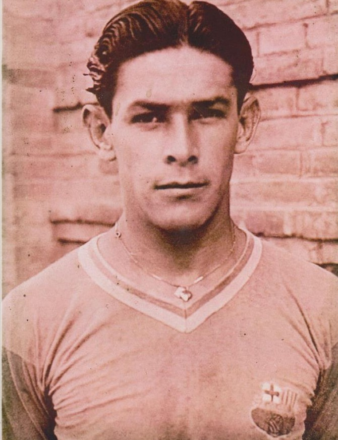 Máximo ídolo de L.D. Alajuelense. Elegido en 1998 futbolista costarricense del siglo, según la IFFHS. Ingresó en 1969 a la Galería Costarricense del Deporte.